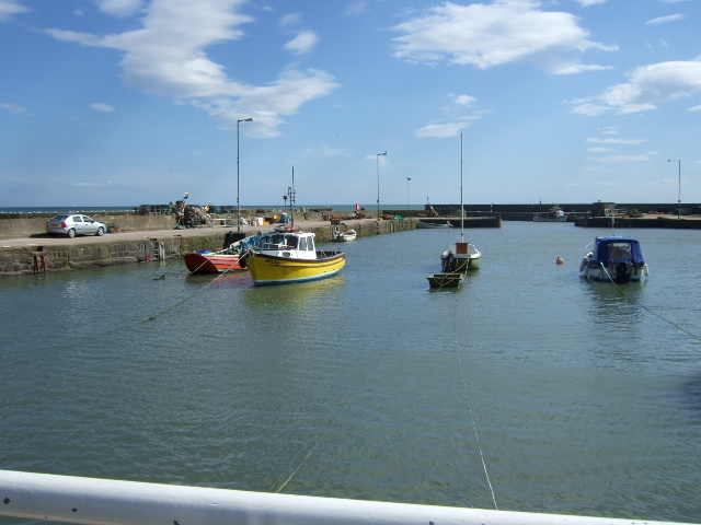 Gourdon harbour, Aberdeenshire